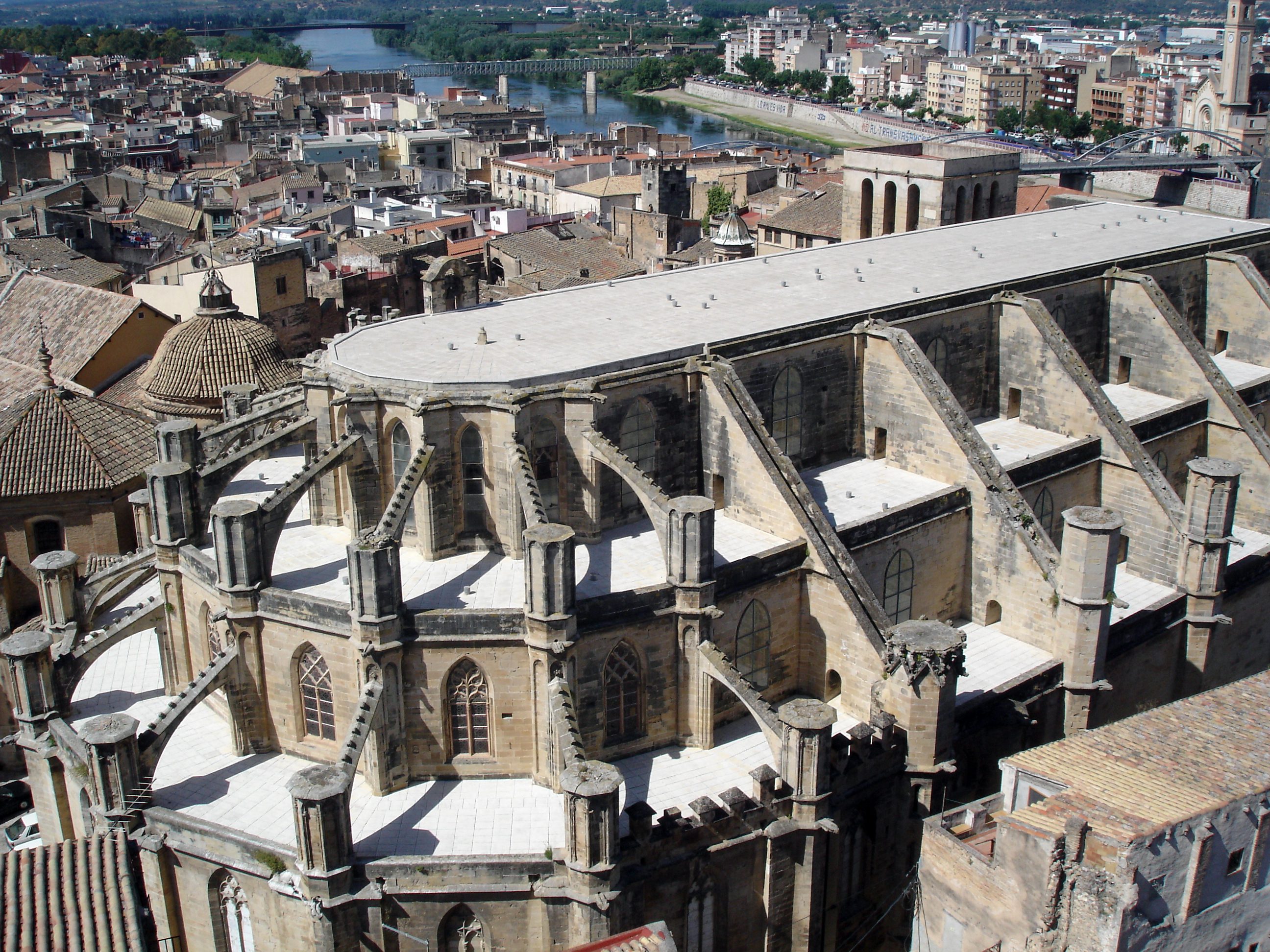 Tortosa - Tarragona Sortida 30/10/2005